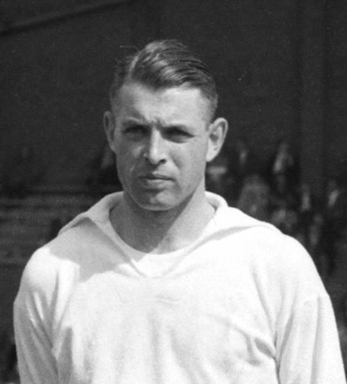 Frans Swinkels in 1961.